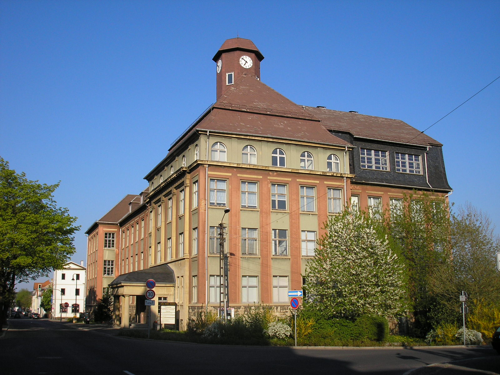 Das neue Technikum (zweites Gebäude der TU Ilmenau, erbaut 1926) in der Weimarer Straße (Ilmenau).